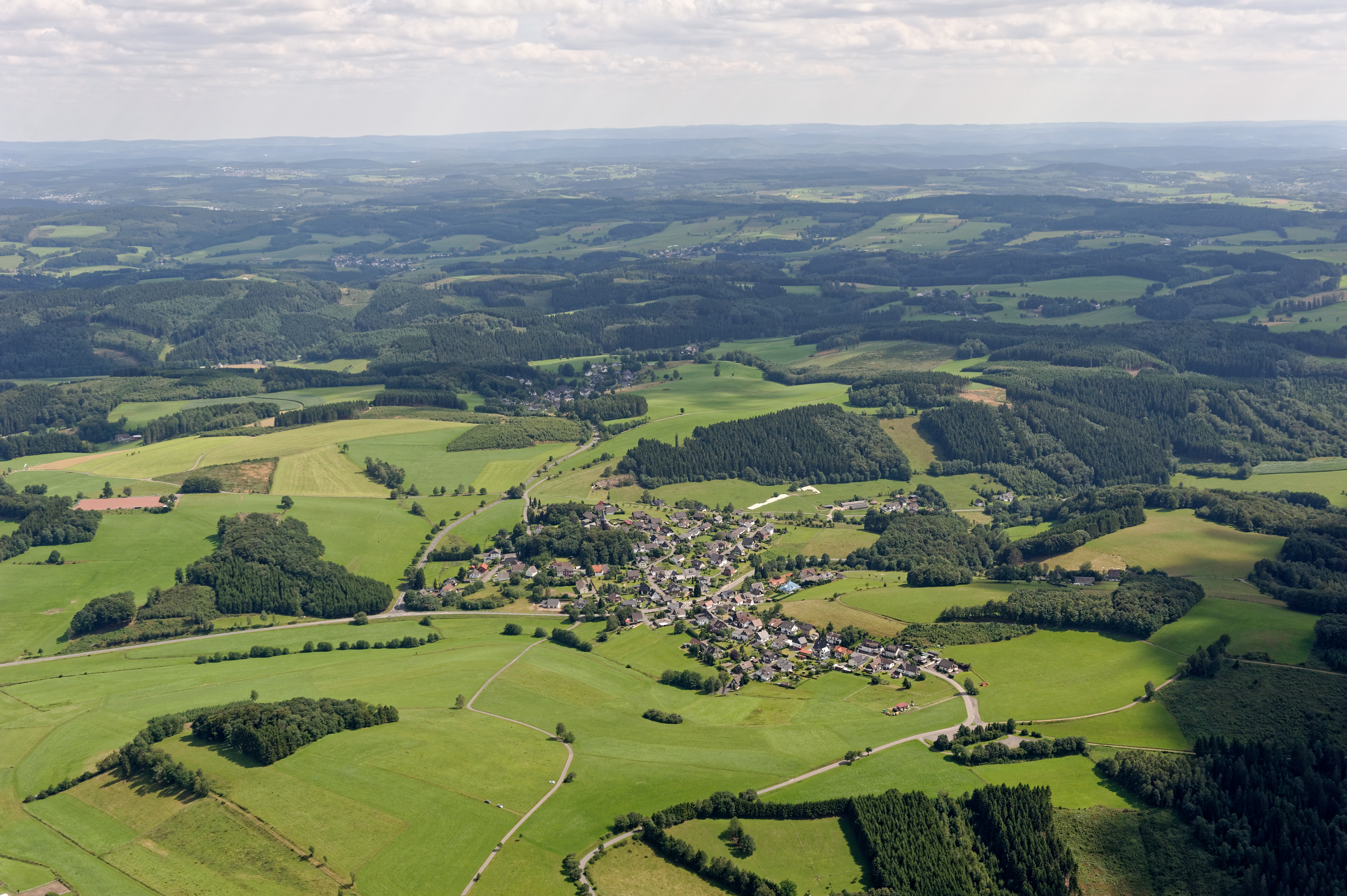 Fotoflug Sauerland West. Bergneustadt-Belmicke, Blick Richtung Südosten. The making of this document was supported by the Community-Budget of Wikimedia Germany.